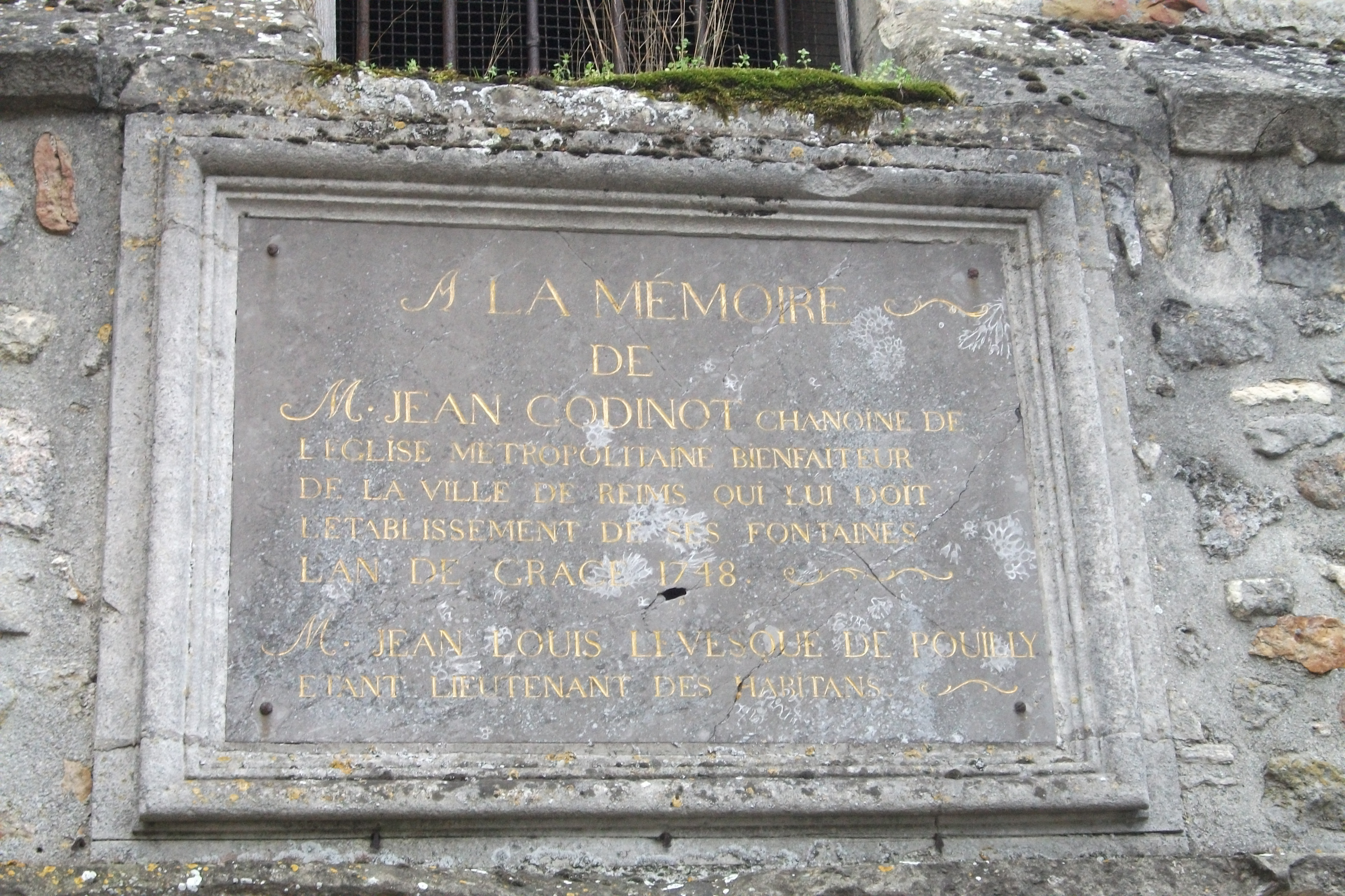 Plaque ne hommage à Jean Godinot qui fit beaucoup pour l'installation de fontaines à Reims.